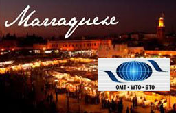 Marraquexe Organização Mundial do Comércio (OMC)